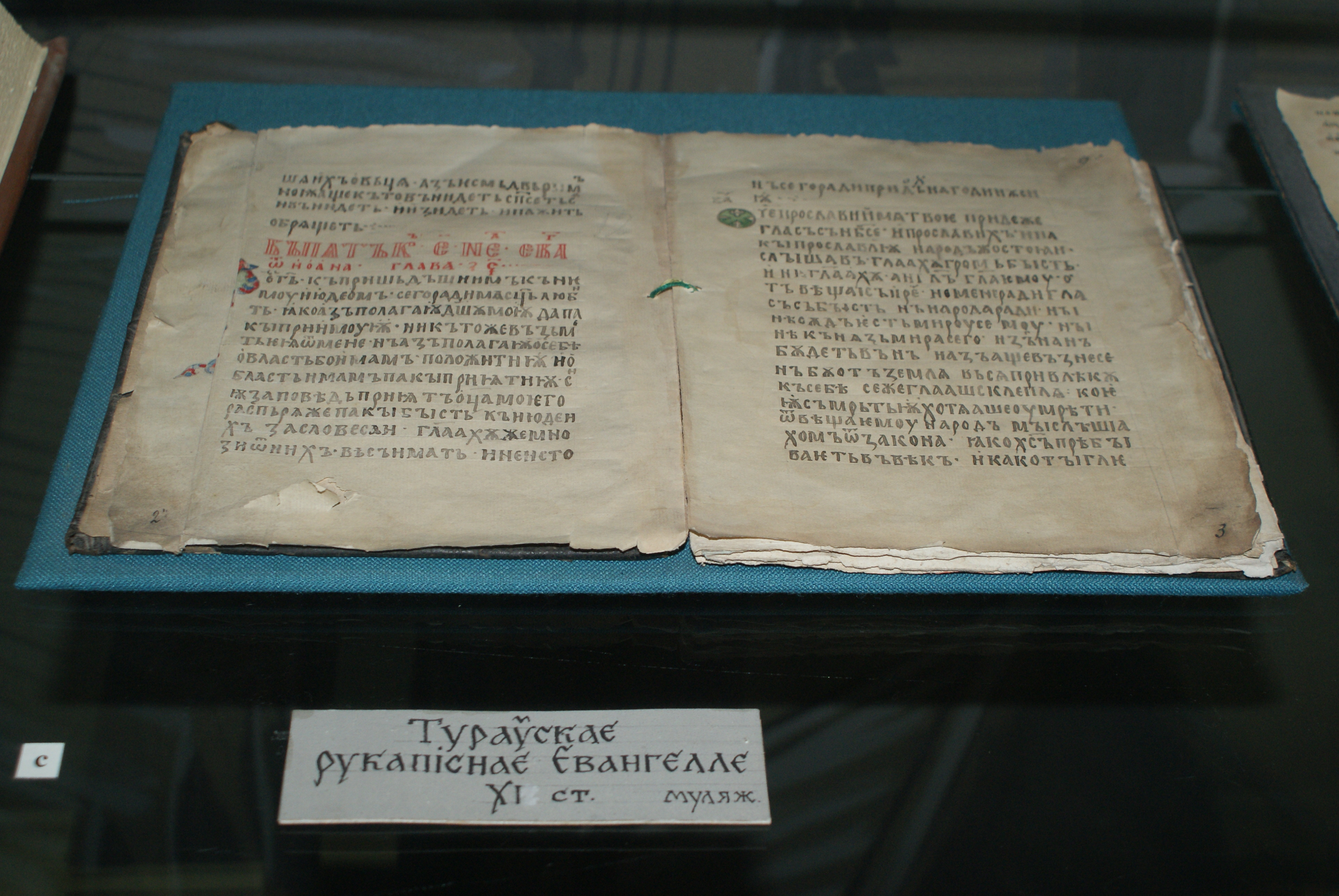 Тураўскае рукапіснае Евангелле XI ст. (муляж)